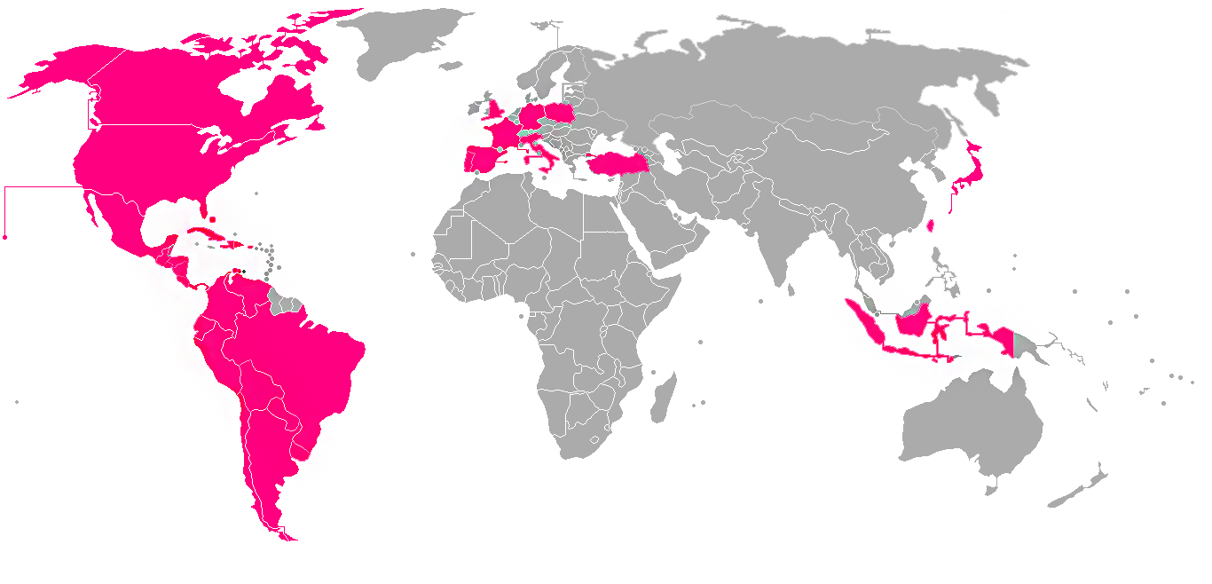 Mapa con los países que han participado en al menos una edición del Reinado Internacional del Café.